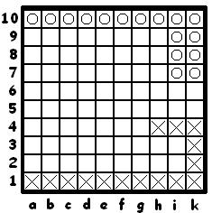 Пример широкого фронта в "Войне вирусов"